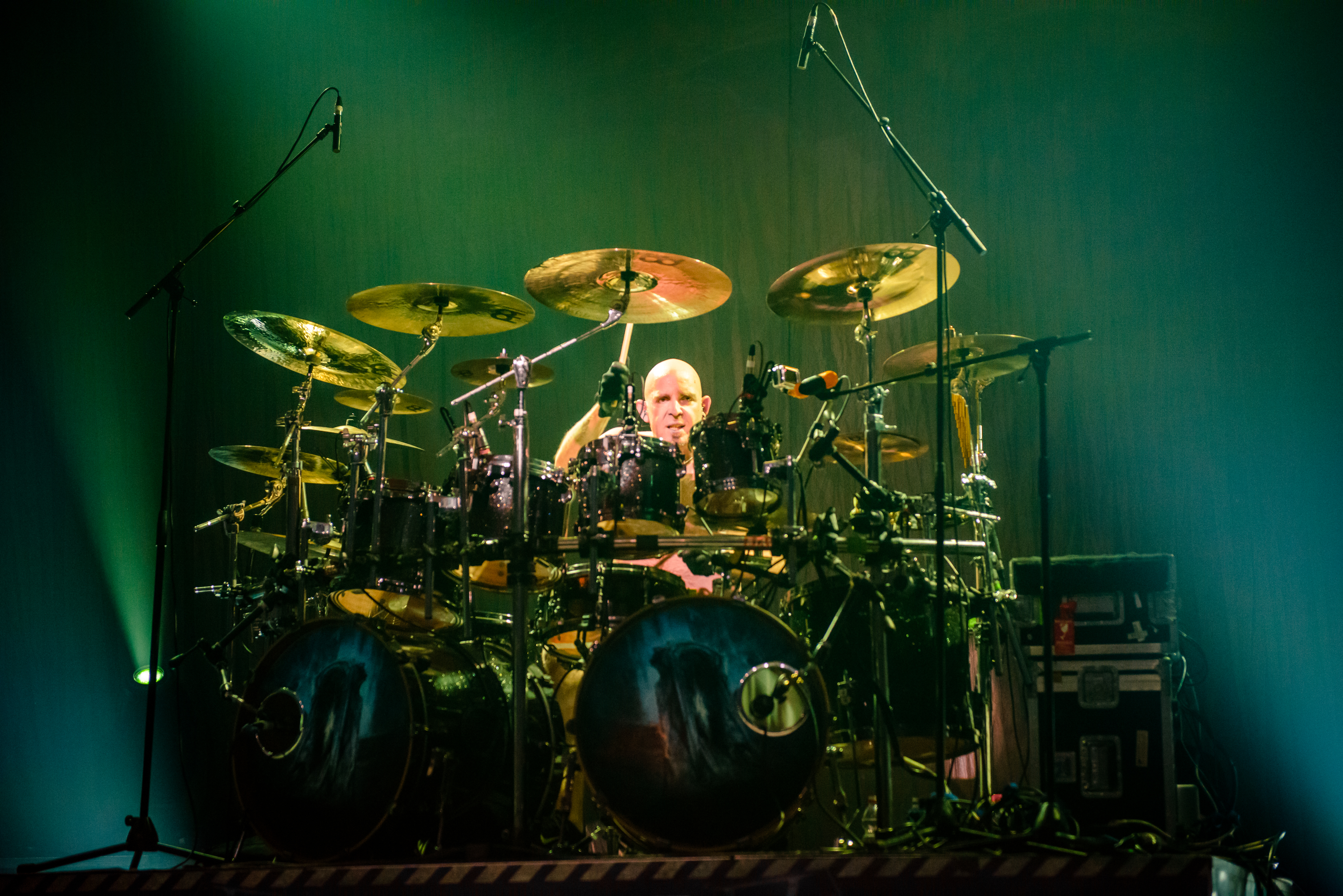 'Ruhrpott Metal Meeting 2016; Oberhausen Turbinenhalle': 'Blind Guardian'